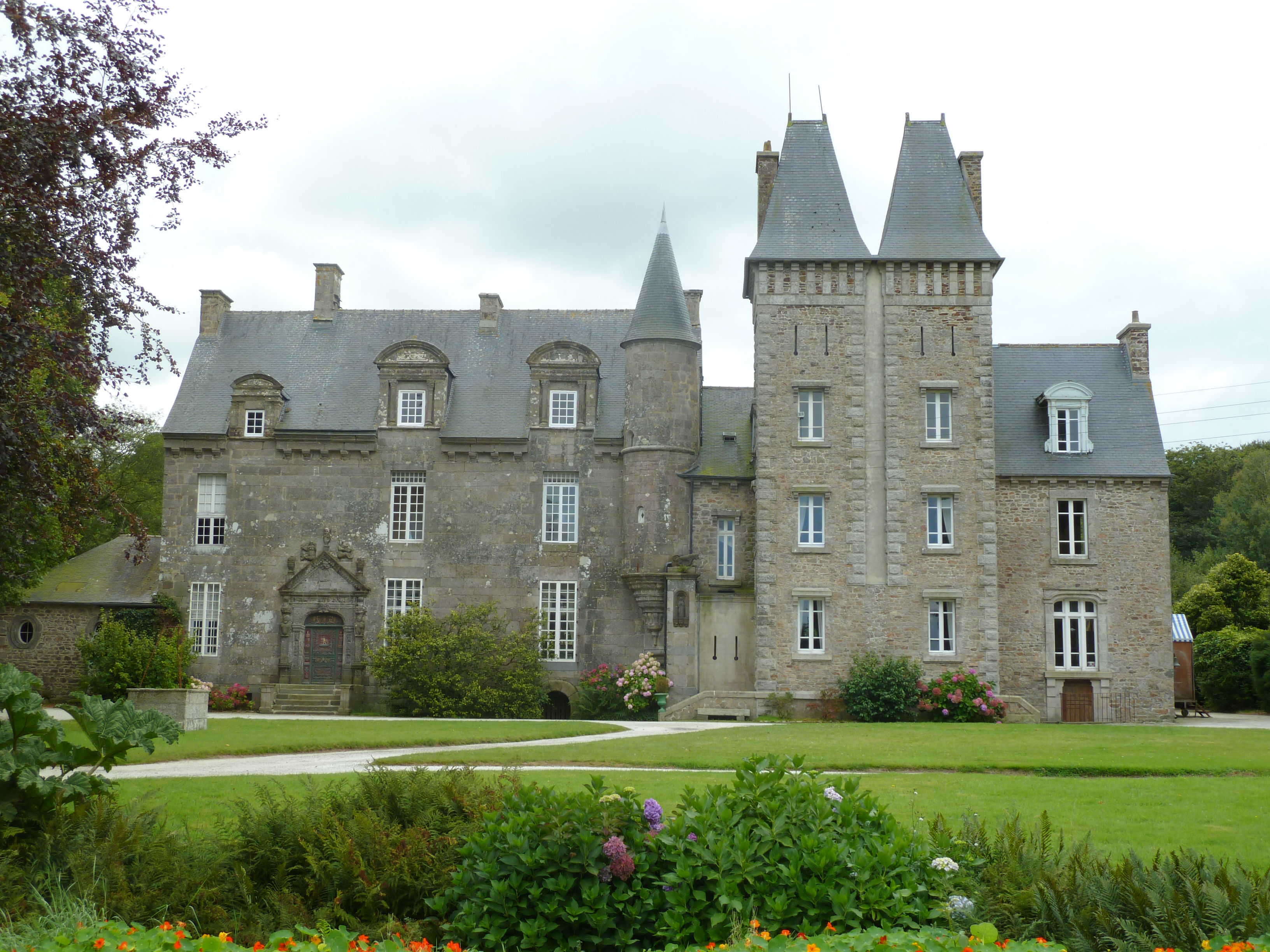 Château de Trebodennic à Ploudaniel